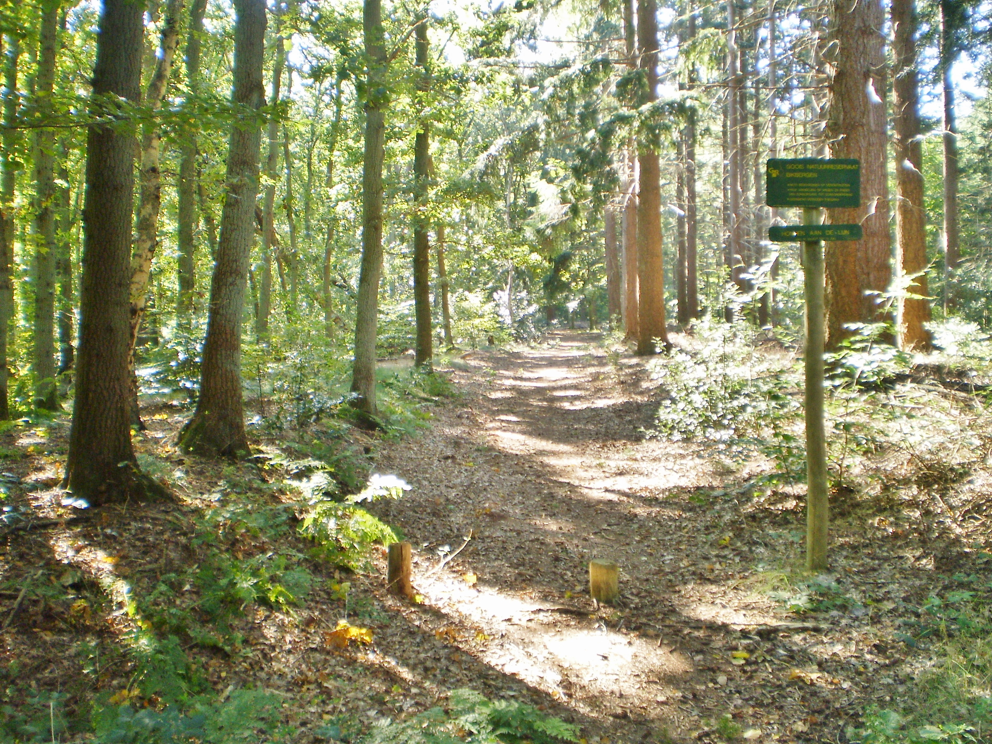 Bos bij Bikbergen